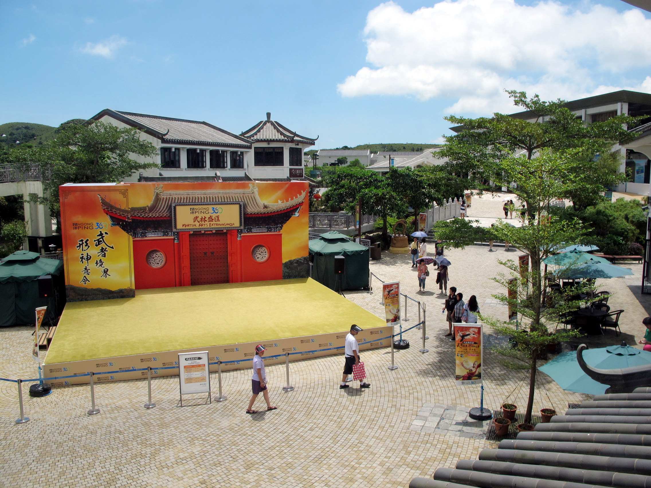 Ngong Ping Village Entry Plaza